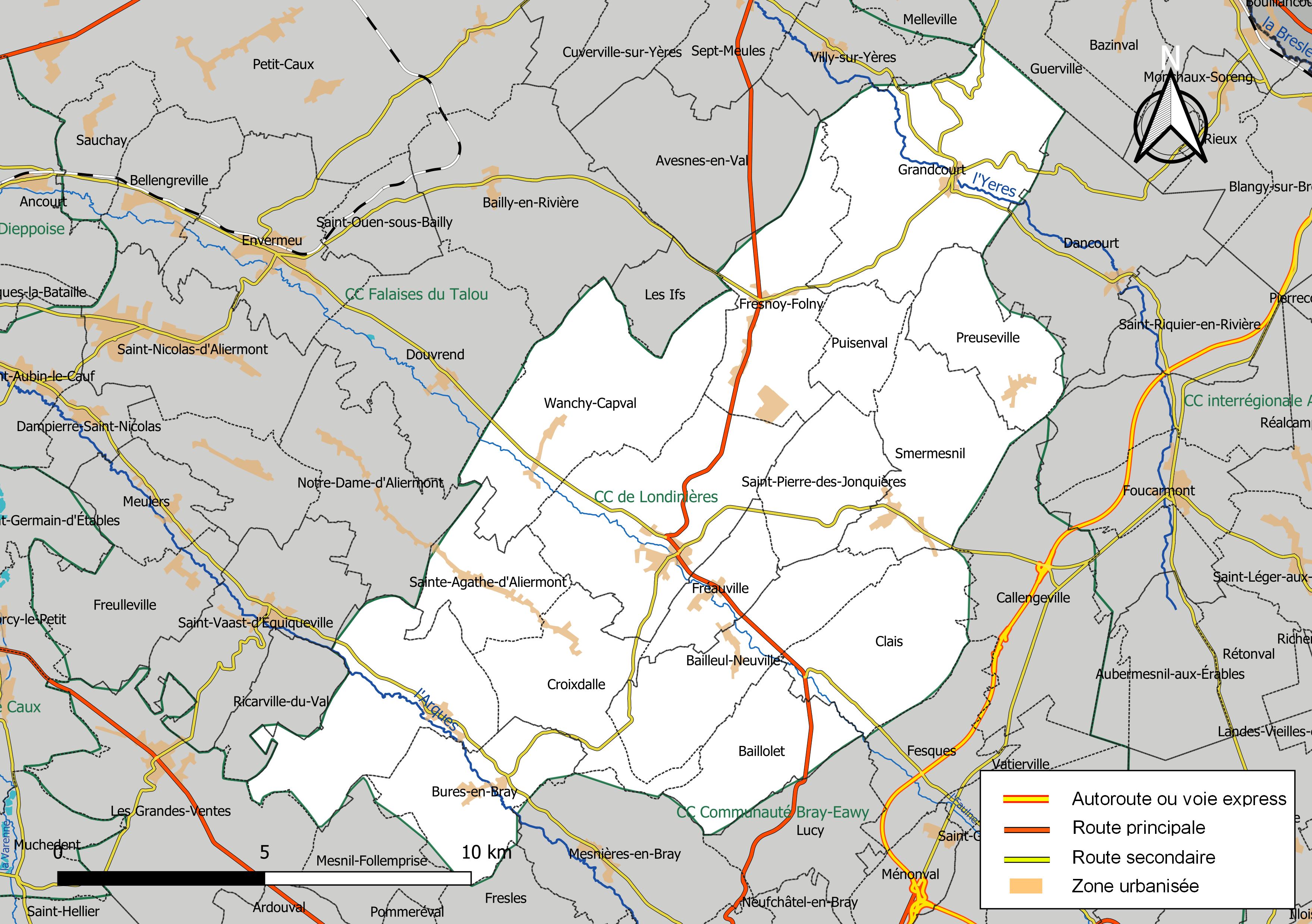 Carte géographique de la Communauté de communes de Londinières, département de la Seine-Maritime, France. Composition au 1er janvier 2019.